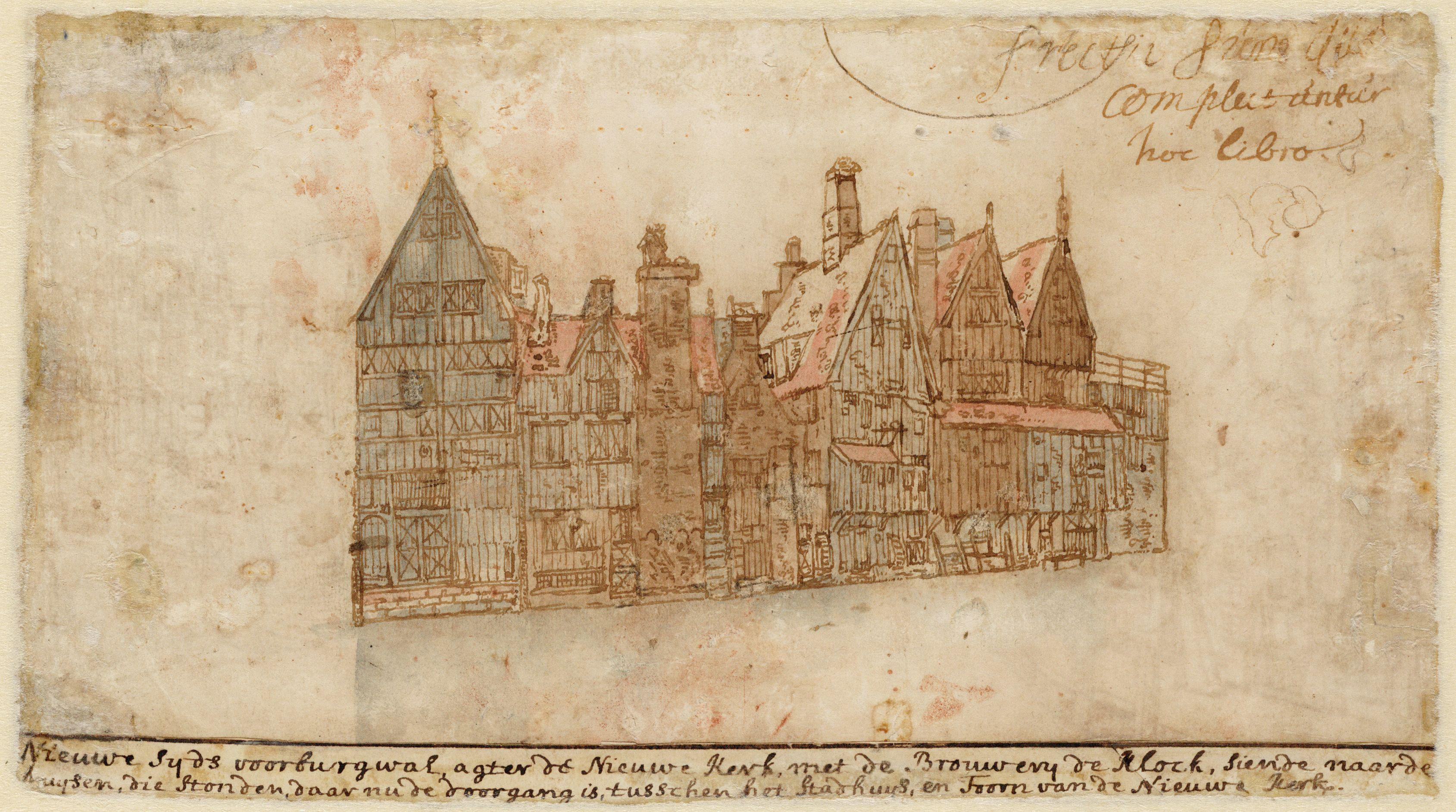 Nieuwezijds Voorburgwal, Amsterdam. drawing. Amsterdam, Stadsarchief Amsterdam, collectie tekeningen en prenten.